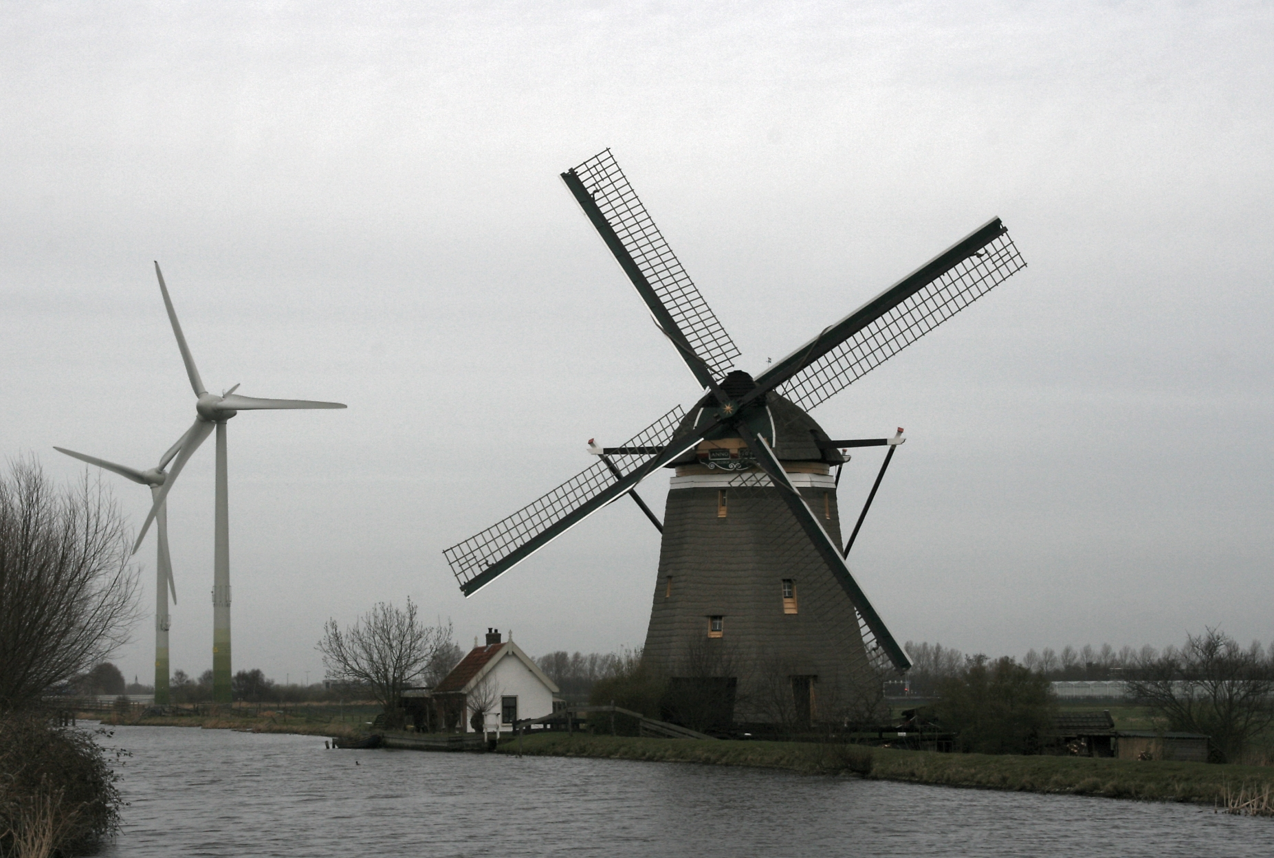 Zoeterwoude-Dorp: molen Zelden van Passe met "Nieuwkomers"